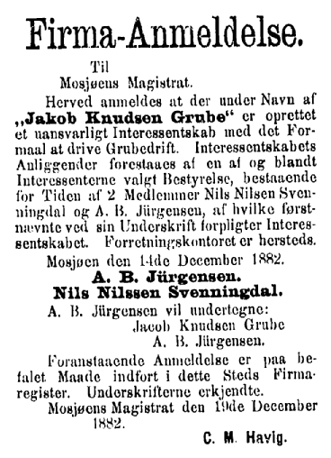 Kunngjørelse i Norsk kundgjørelsestidende om opprettelse av firma Jakob Knudsen Grube i Mosjøen.